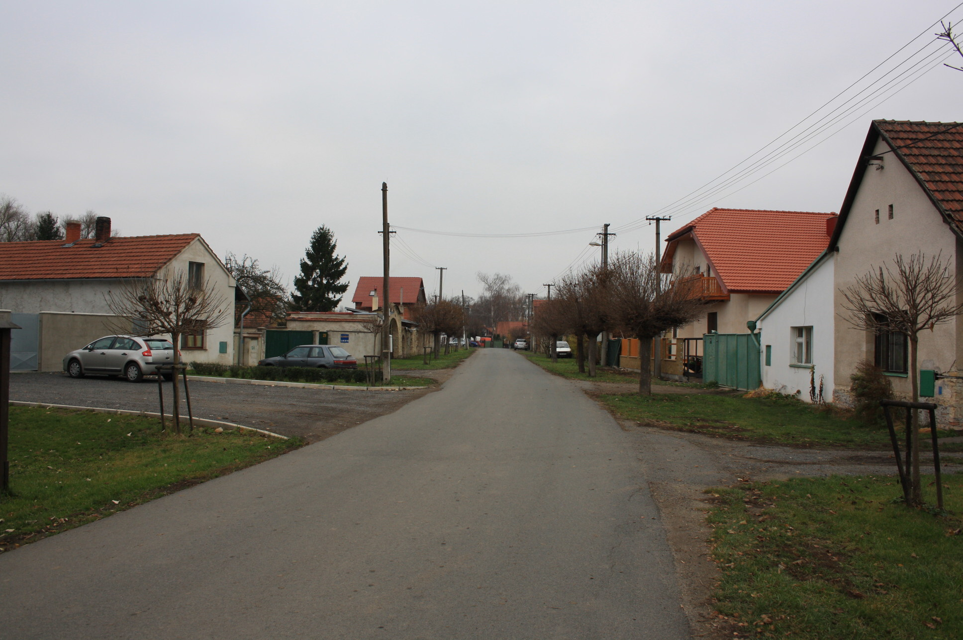 Ulice v obci Kly.